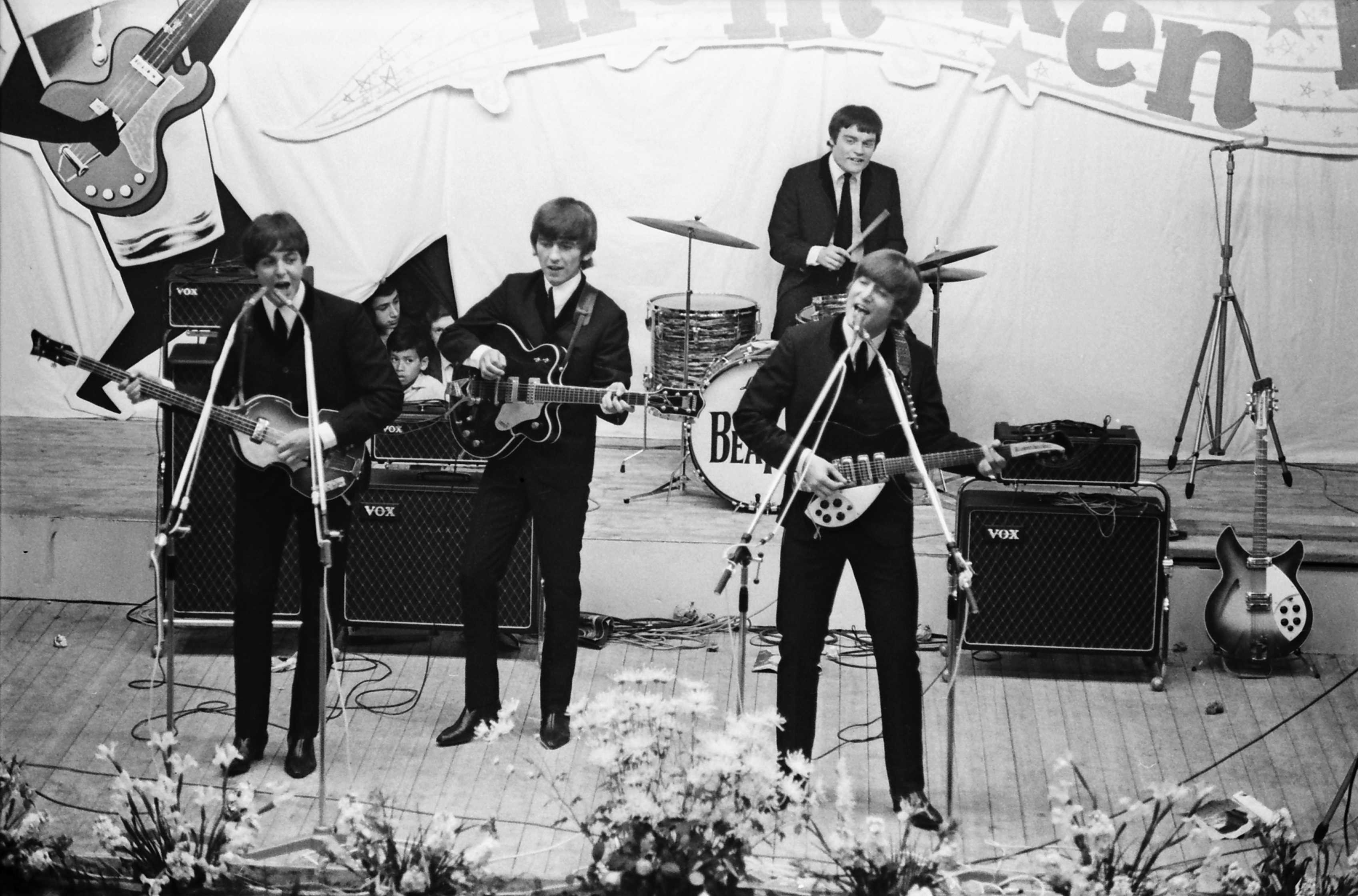 CollectieCollectie Fotoburo de BoerInventarisnummerNL-HlmNHA_1478_02577_03 K_06BeschrijvingFoto van het optreden van de Beatles in BlokkerFotonummerNL-HlmNHA_1478_02577_03 K_06LandNederland ProvincieNoord-Holland GemeenteHoorn PlaatsBlokker Begindatum04-06-1964Einddatum04-06-1964